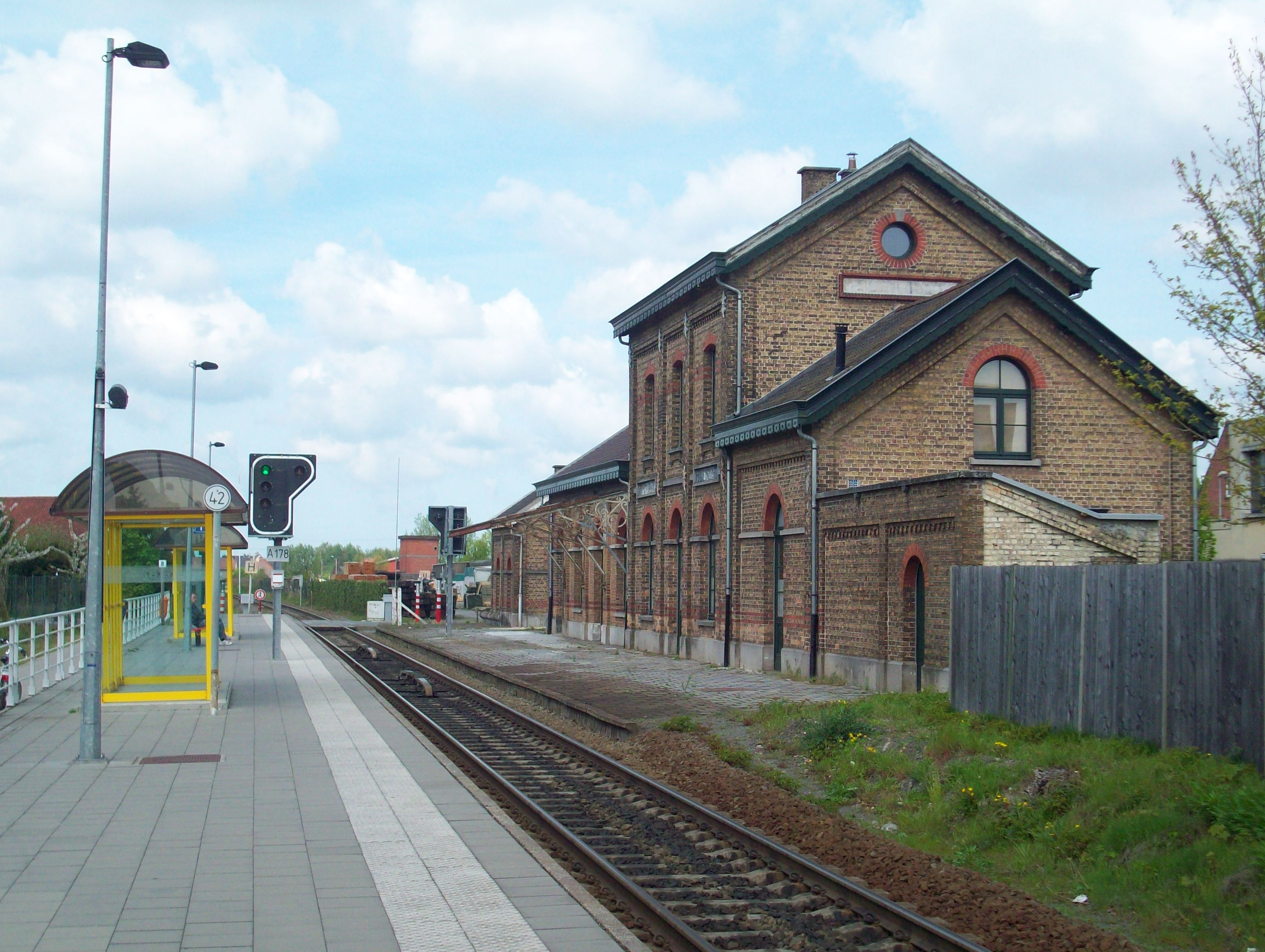 Foto van Station Sleidinge